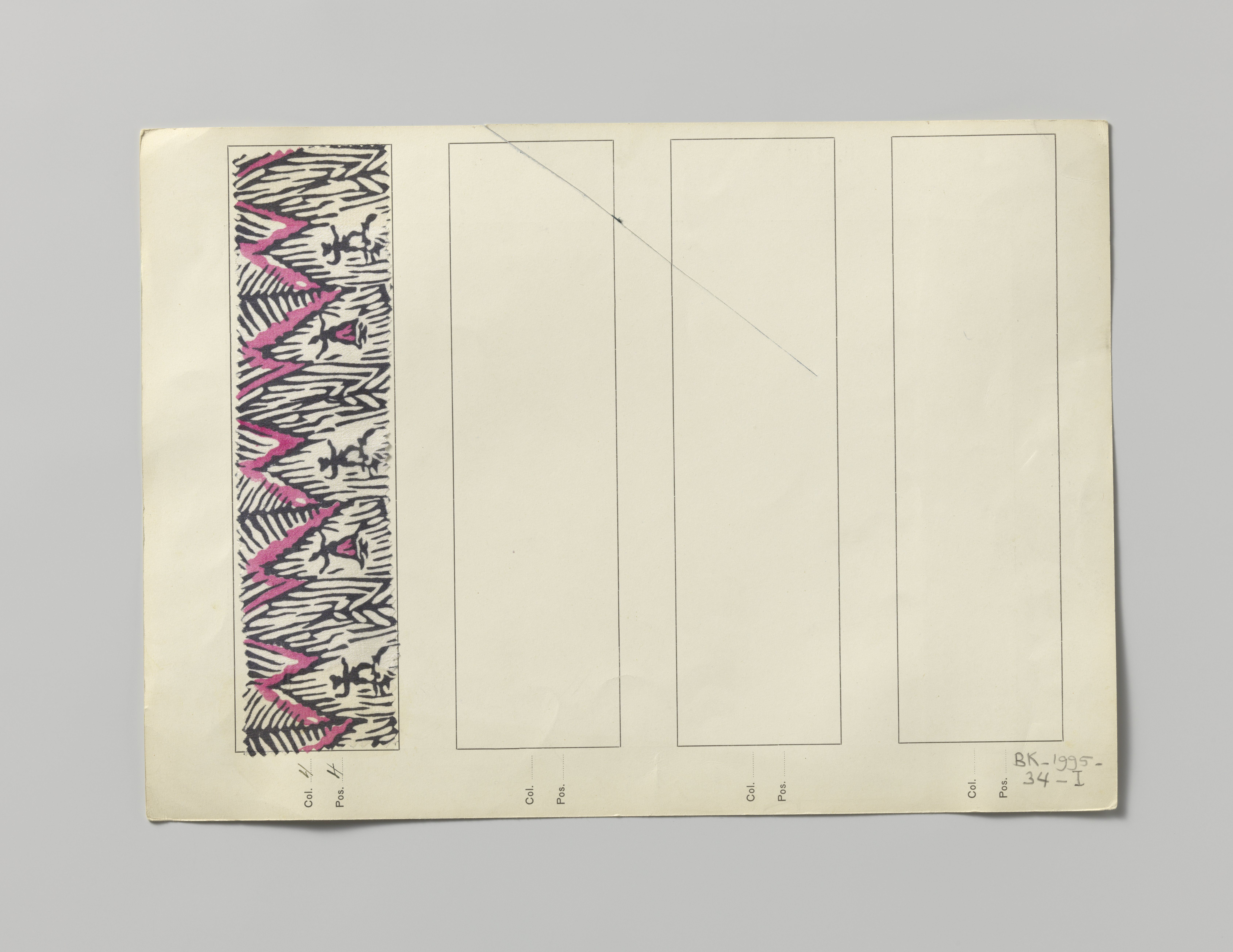 IdentificatieTitel(s): Staal met bedrukte zijde, dessin TanzpaarObjecttype: staal Objectnummer: BK-1995-34-I(V)Omschrijving: Staal met bedrukte zijde. Dessin Tanzpaar, WW nr. 00551. Op naturel fond zigzaglijnen in bruin en zwarte arceringen Waar: binnen dansende figuren. De staal is op karton gelijmd waarop het vignet van de Wie: ner Werkstätte. Op de achterzijde een kleurvariant met roze en zwart.VervaardigingVervaardiger: vervaardiger: Wiener Werkstätteontwerper: Heddi Hirsch-LandesmanPlaats vervaardiging: WenenDatering: 1915Fysieke kenmerken: bedrukte zijde op kartonMateriaal: zijde karton Techniek: effenbinding / blokdrukAfmetingen: karton: h 25 cm. × b 35 cm. zijde: h 5,7 cm. × b 21,7 cm. Verwerving en rechtenVerwerving: aankoop 1995Copyright: Publiek domein